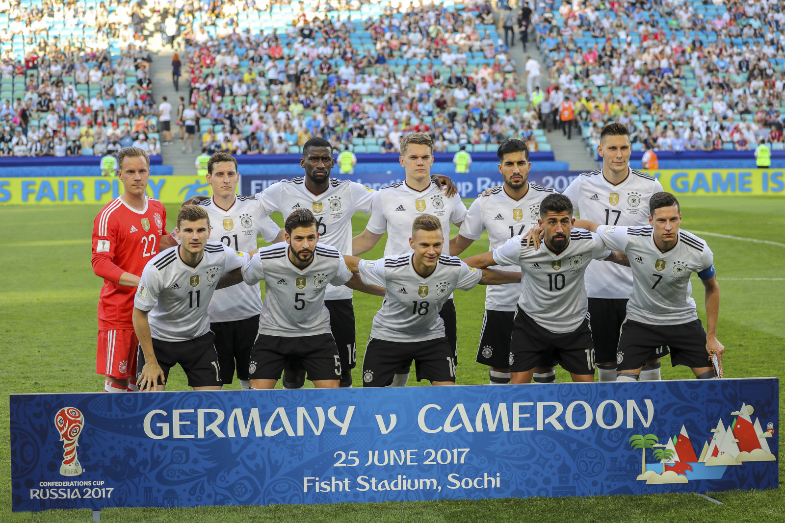 Германия - Камерун